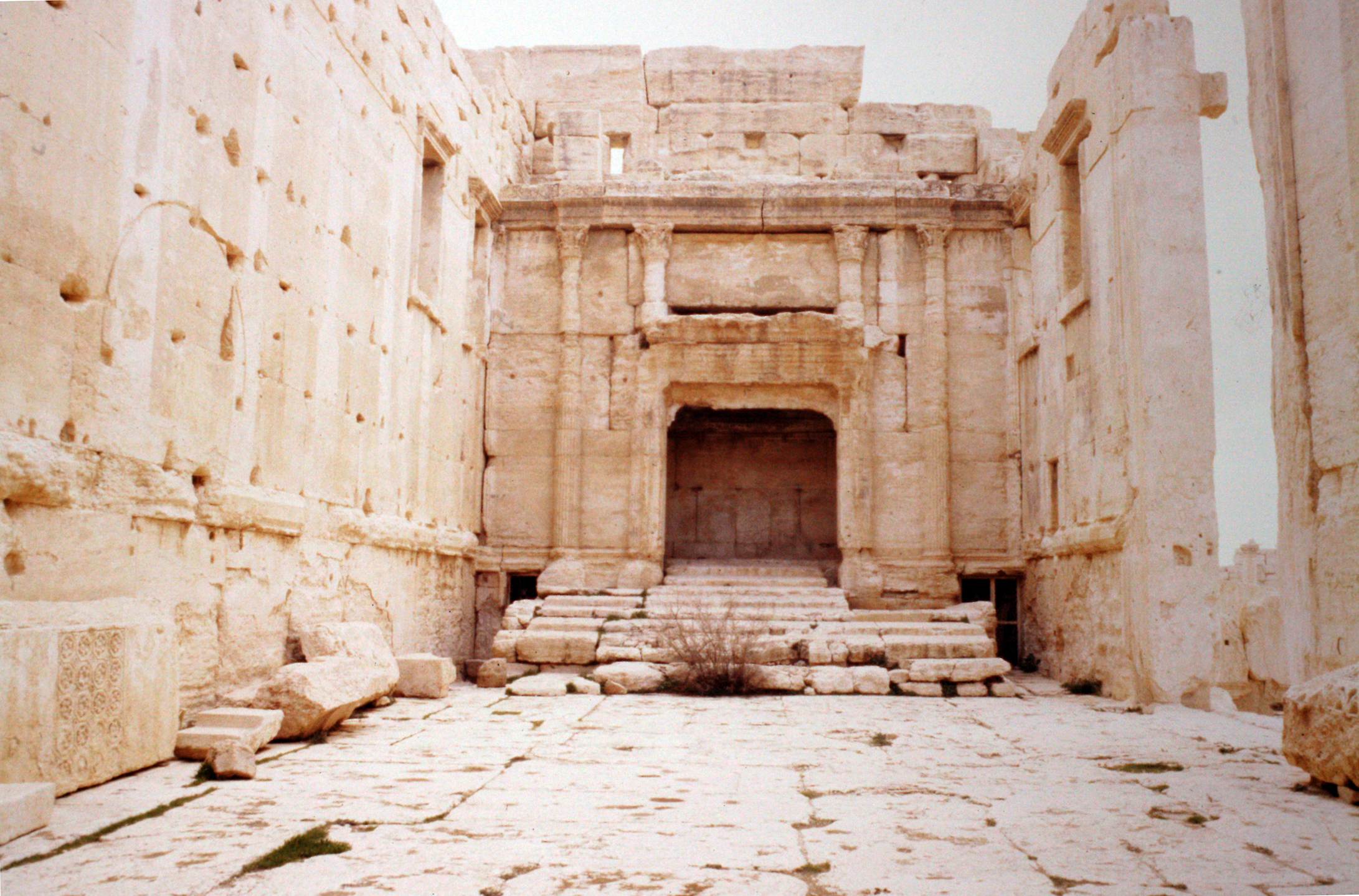 Siria, Palmira, Tempio di Bel, interno della cella, adyton sul lato sud (1993)